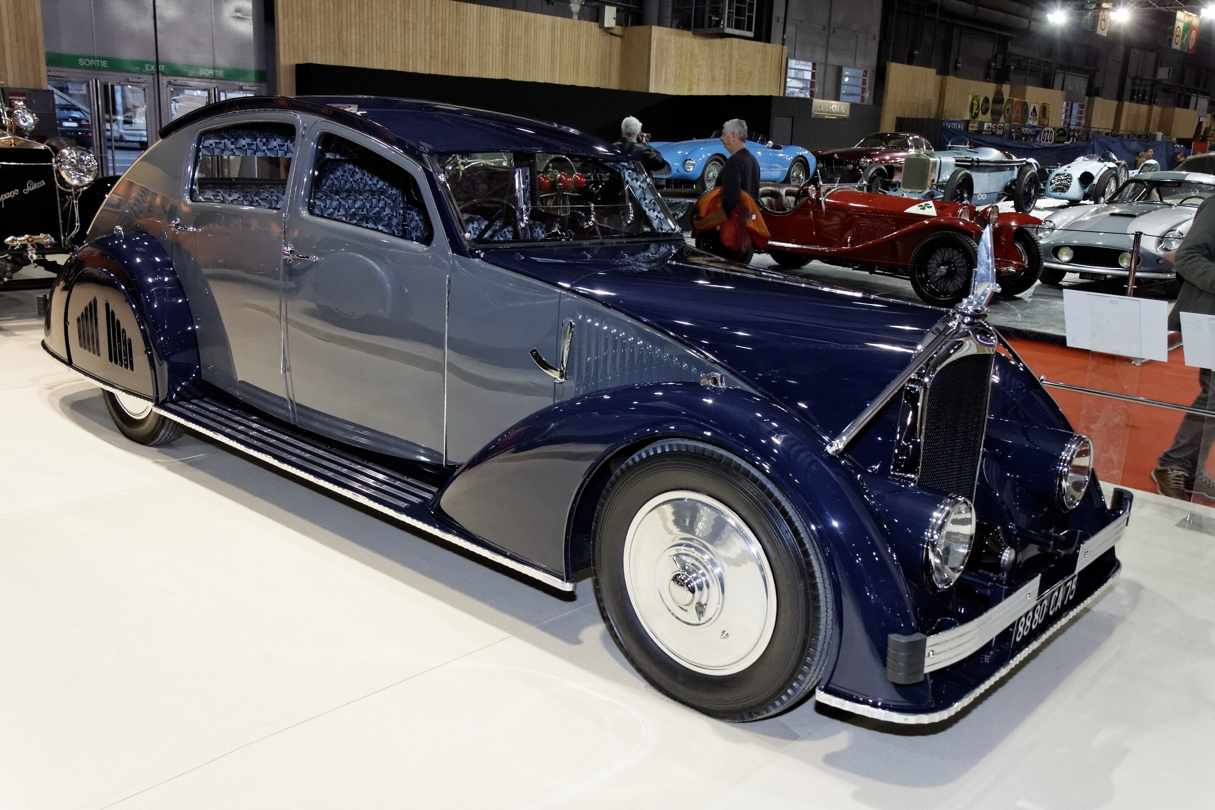 Voisin type C25 aérodyne